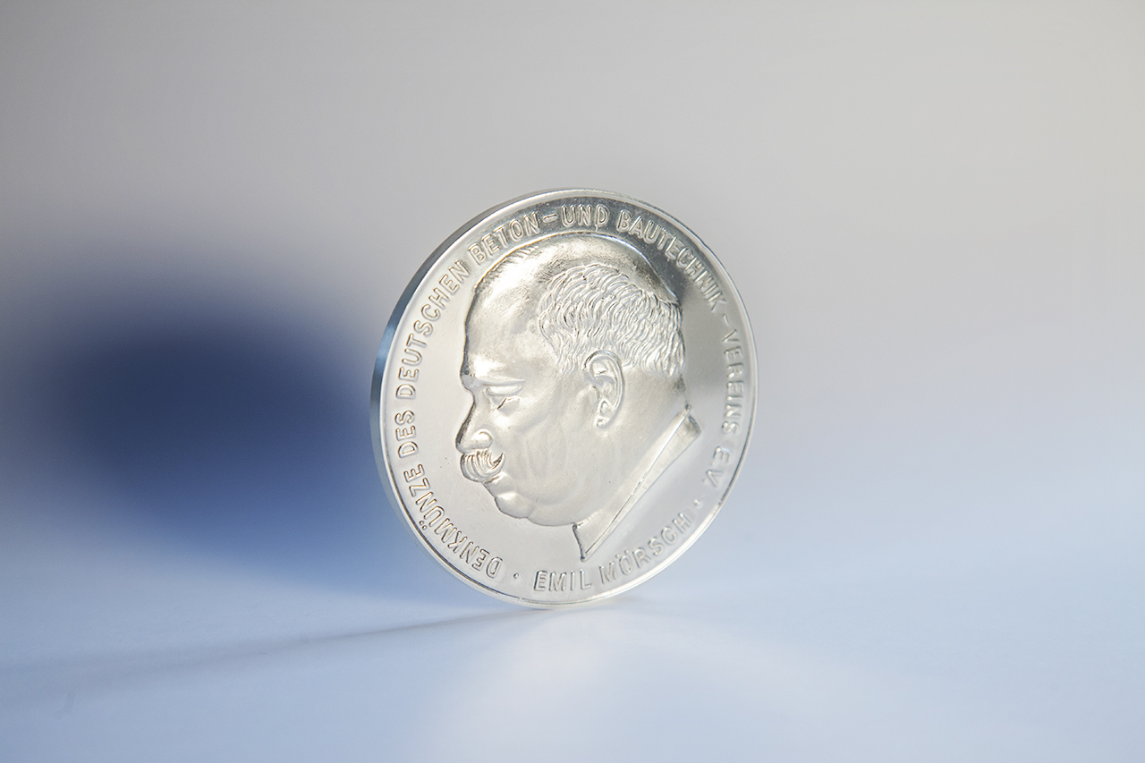 Vorderseite der Emil-Mörsch-Denkmünze mit dem Abbild von Emil Mörsch. Sie ist eine Denkmünze des Deutschen Beton- und Bautechnik-Vereins e. V.